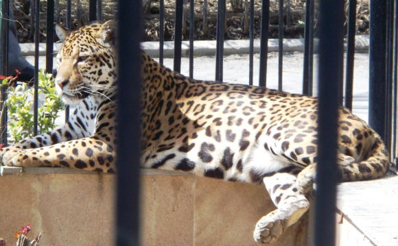 ягуар в бакинском зоопарке